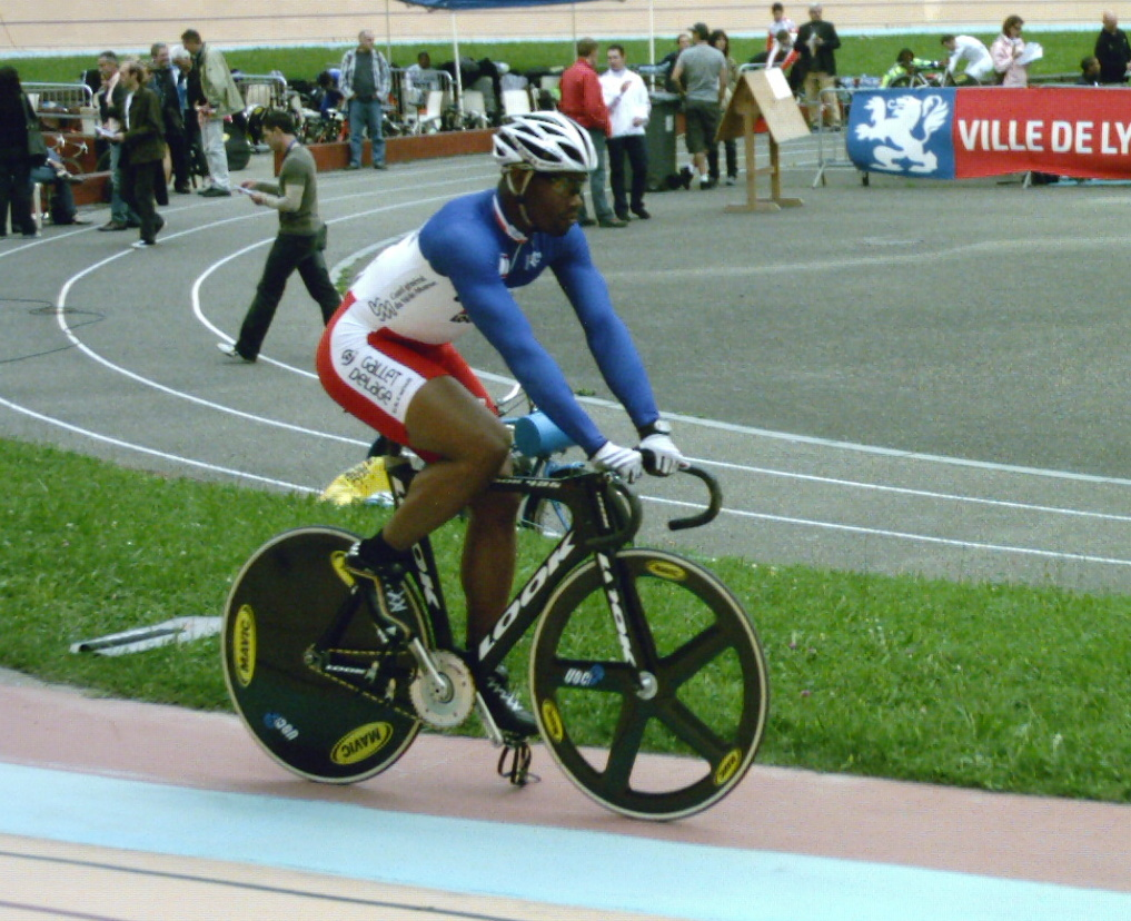 Gregory Baugé lors d'une compétition de cyclisme sur piste à Lyon.